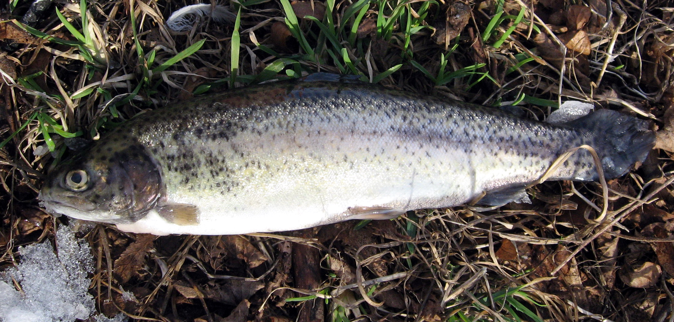 Pstruh duhový